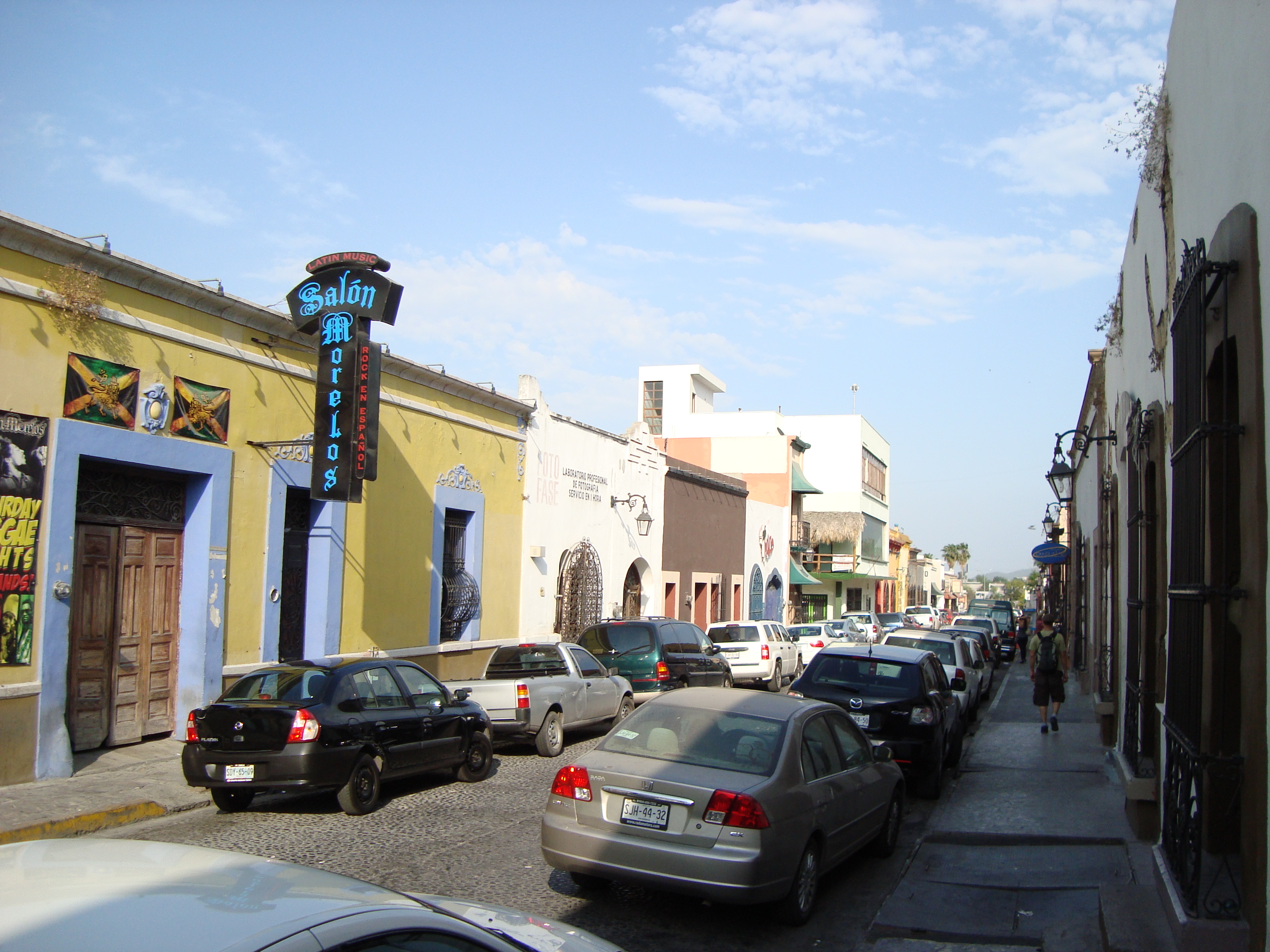 Barrio Antiguo de Monterrey, Nuevo León.